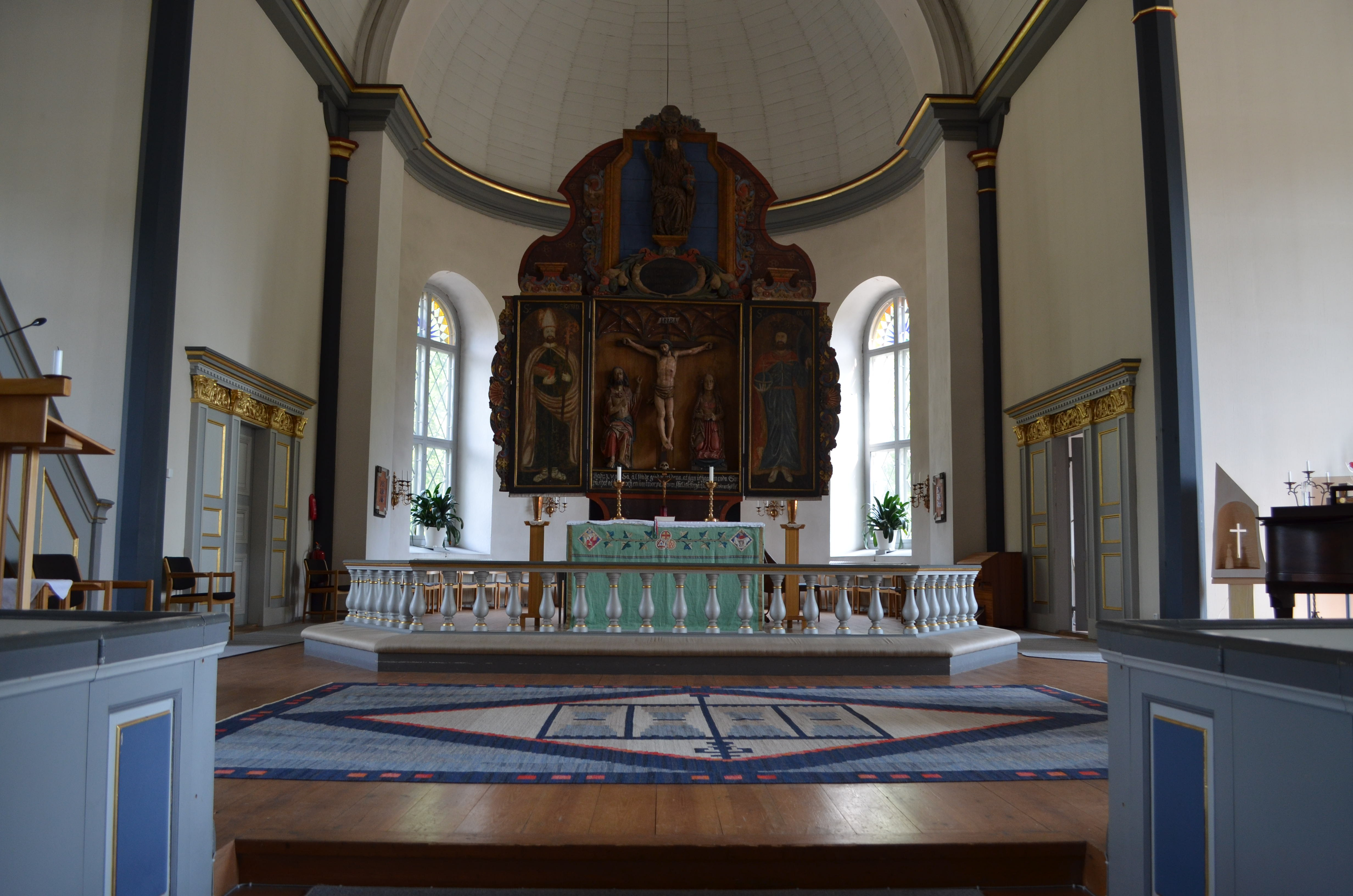 Kyrkorumet